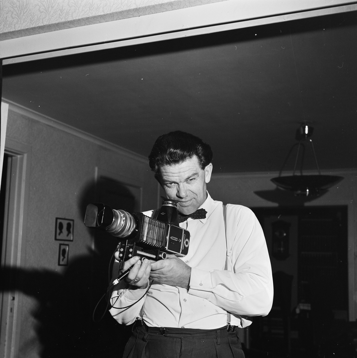 Per Hafslund (1918–1990) var en norsk zoolog, fotograf og formidler, kjent som programleder i NRK og omtalt som landets første TV-kjendis.